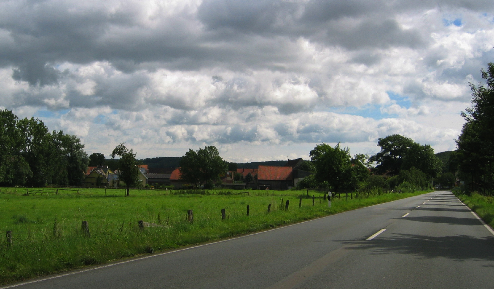 Blick von Westen entlang der Heristiestraße auf Herste, Bad Driburg, Deutschland.